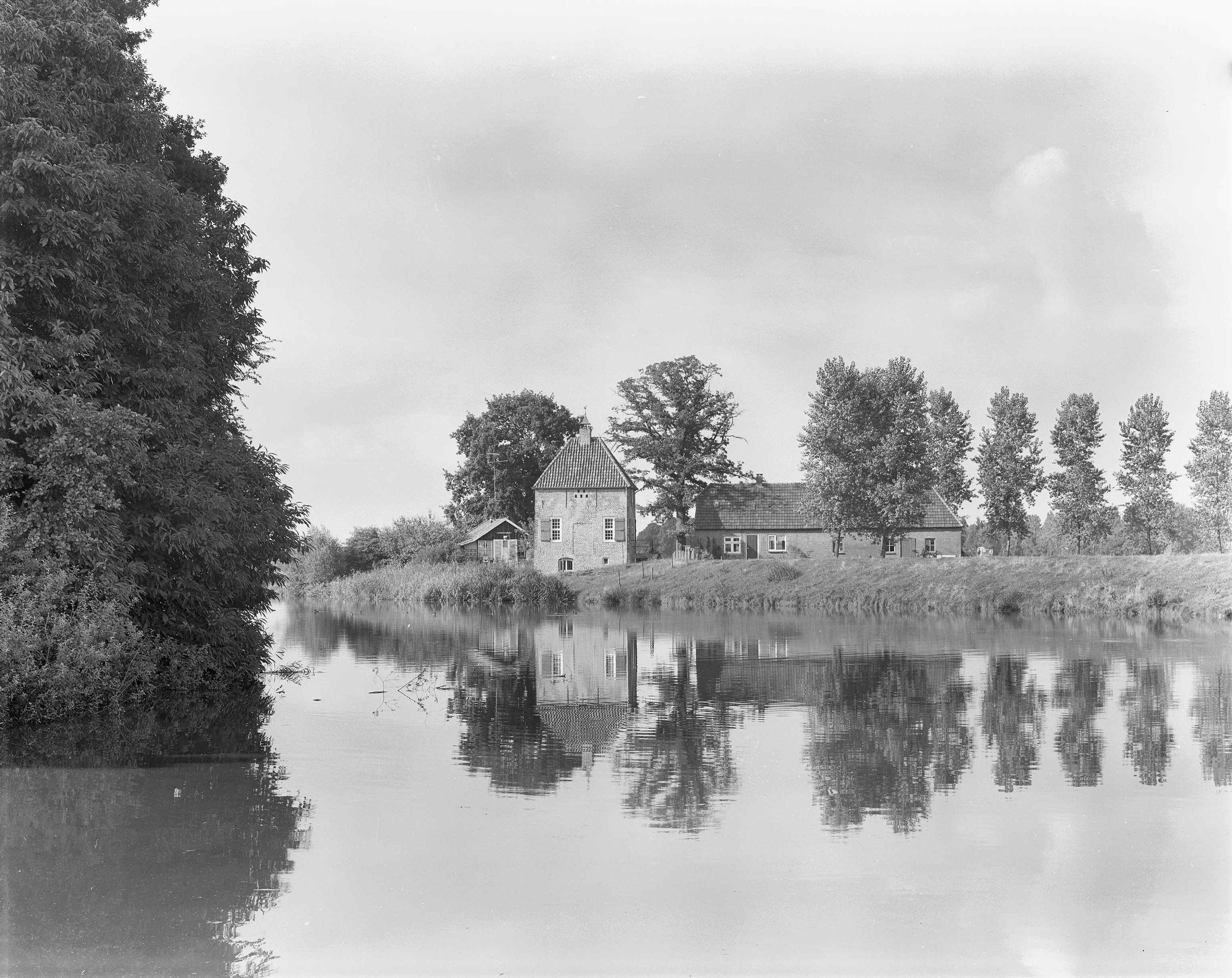 Diversen: "'t Vaantje", exterieur overzicht